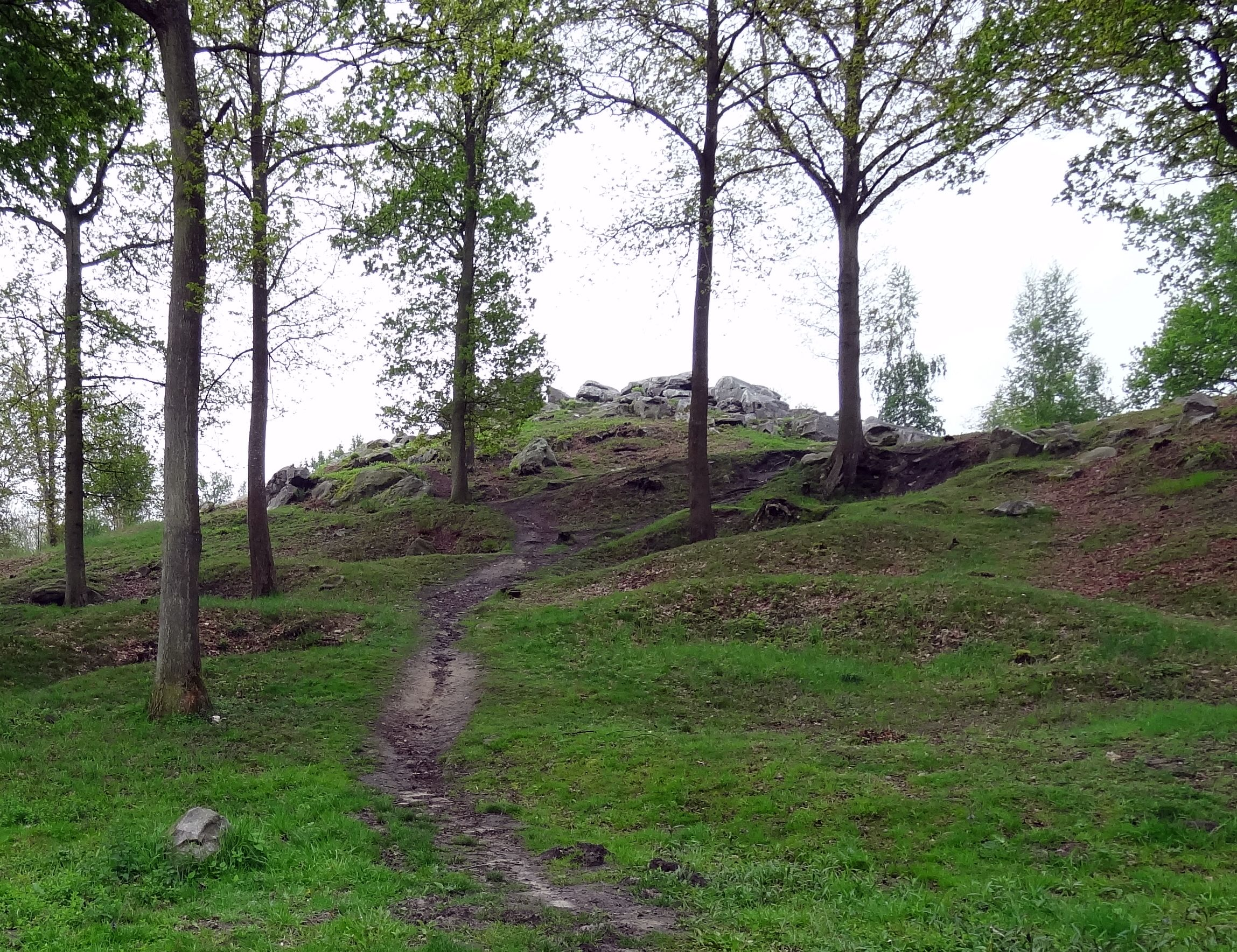 La Hottée de Gargantua (Molinchart), en France. Le sentier qui mène au sommet.